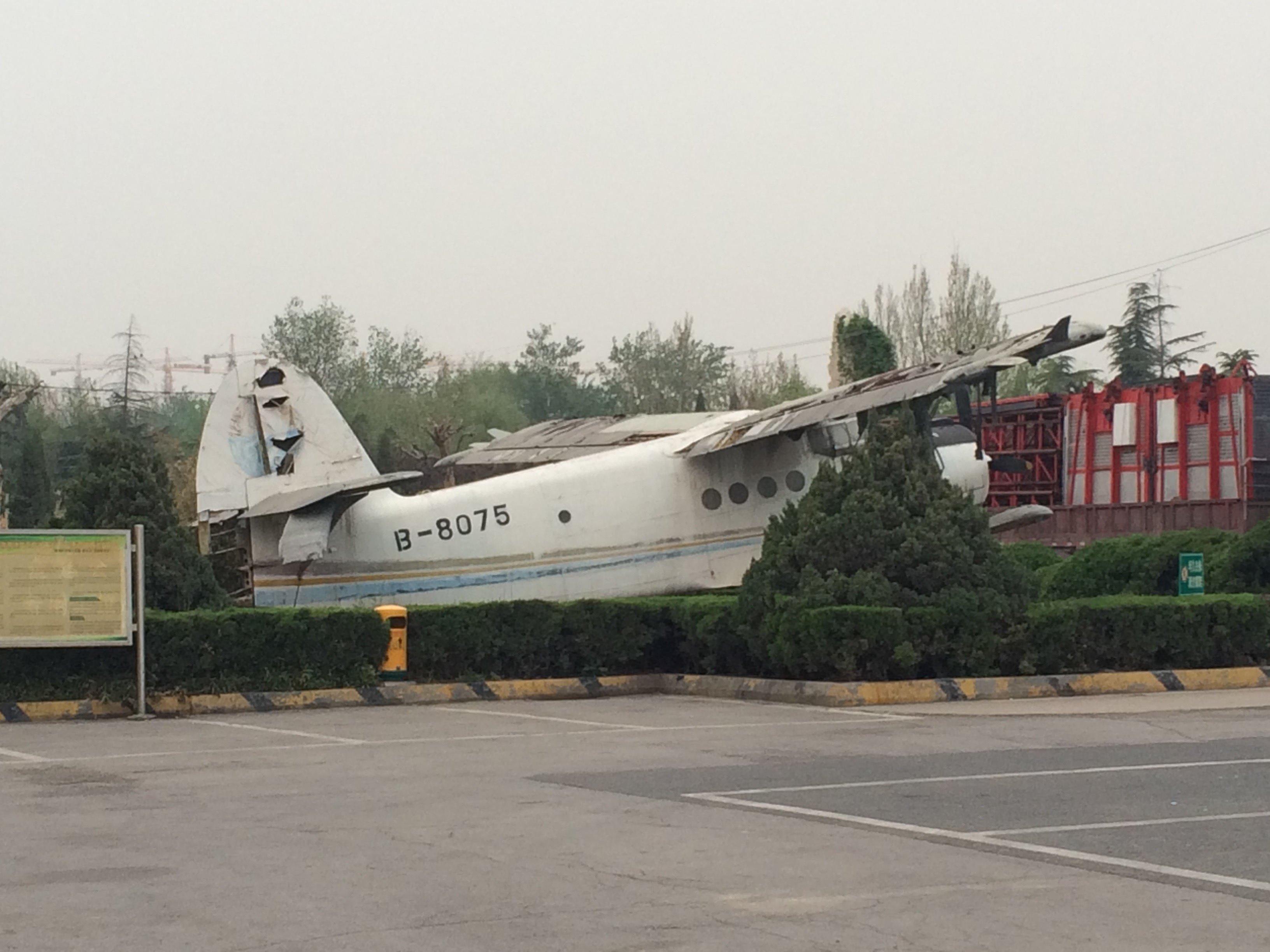 山东省济南市历城区G35济广高速济南服务区